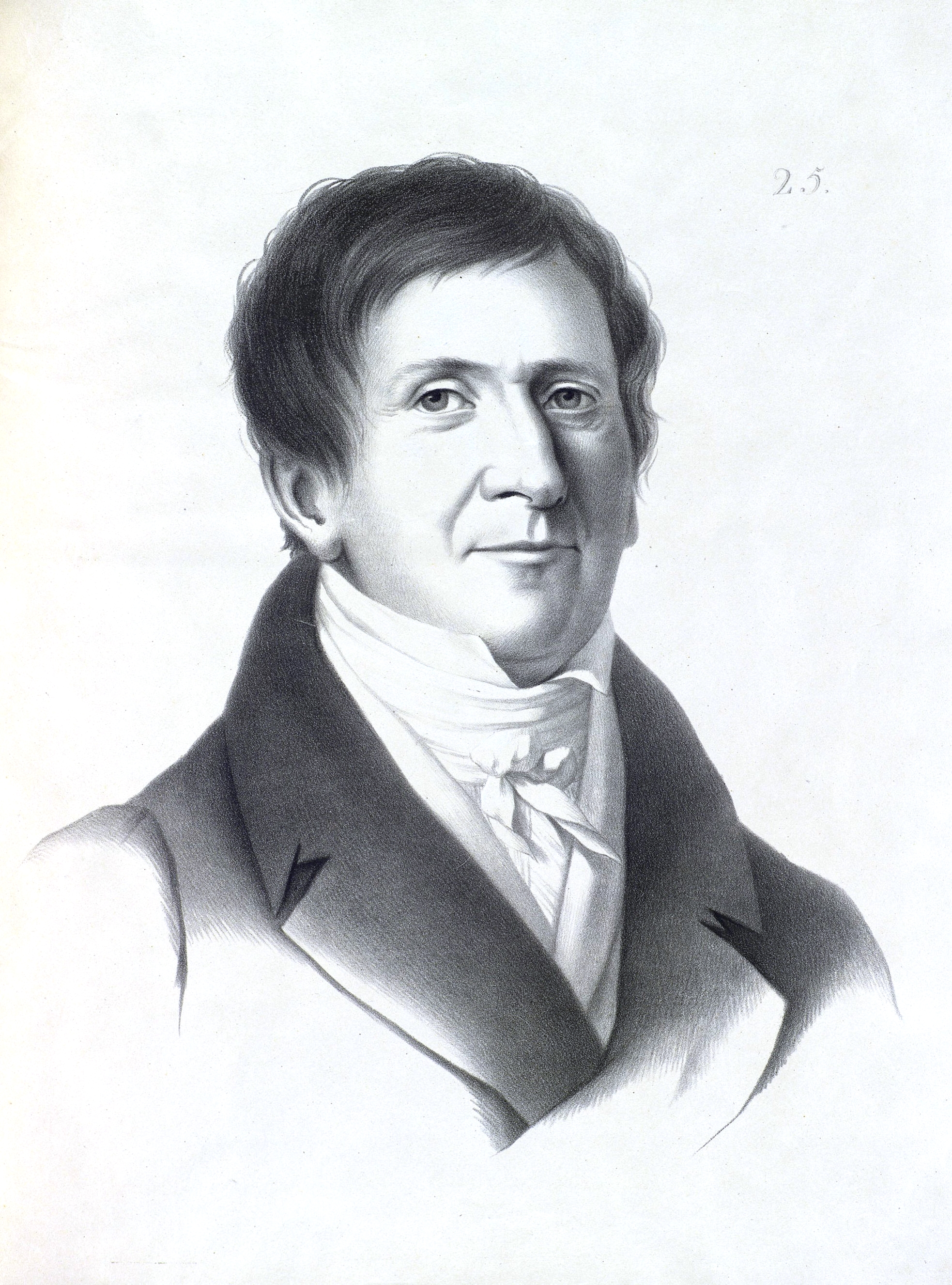 Кюгельген, Герхардт фон